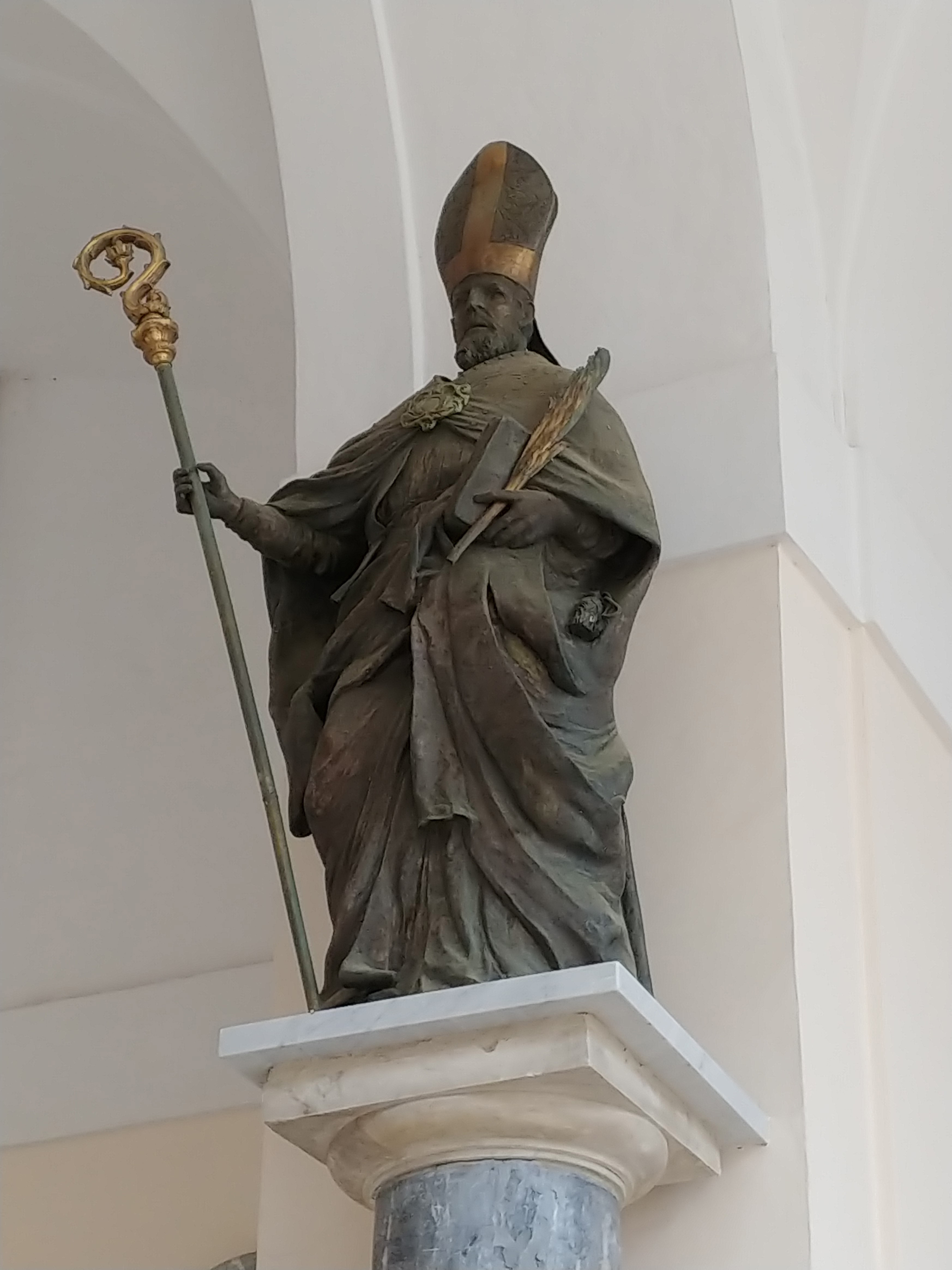 La statua, opera di Erasmo Vaudo, di San Marciano Vescovo, all'interno del pronao della Cattedrale di Gaeta.